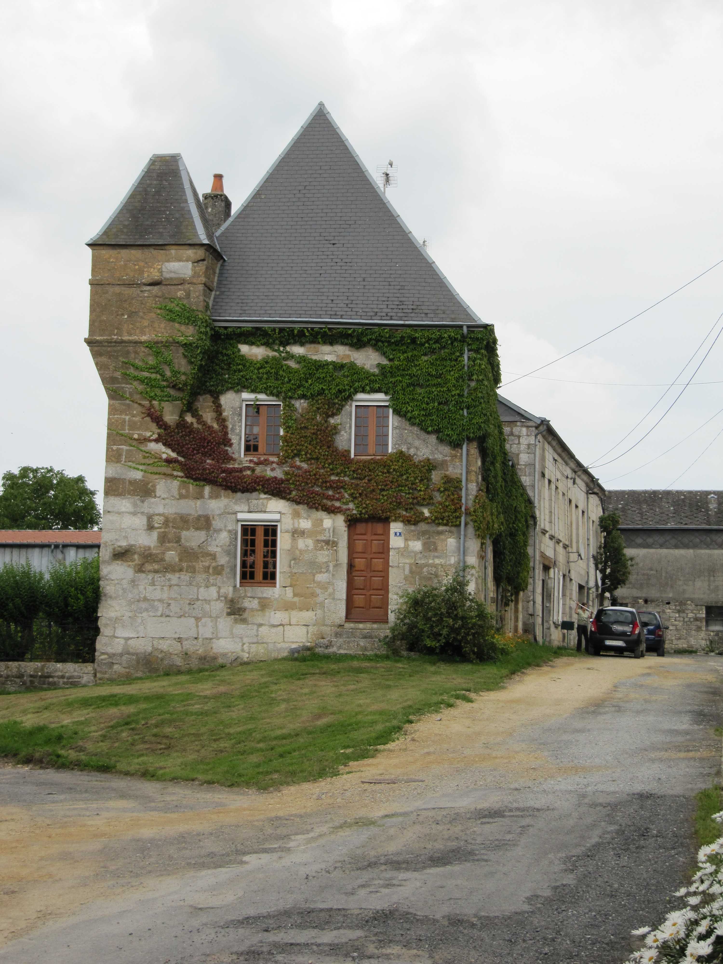 Maison de Jean Nicolas Pache ancien maire de Paris à Thin-le-Moutier Ardennes France photographiée en 2011